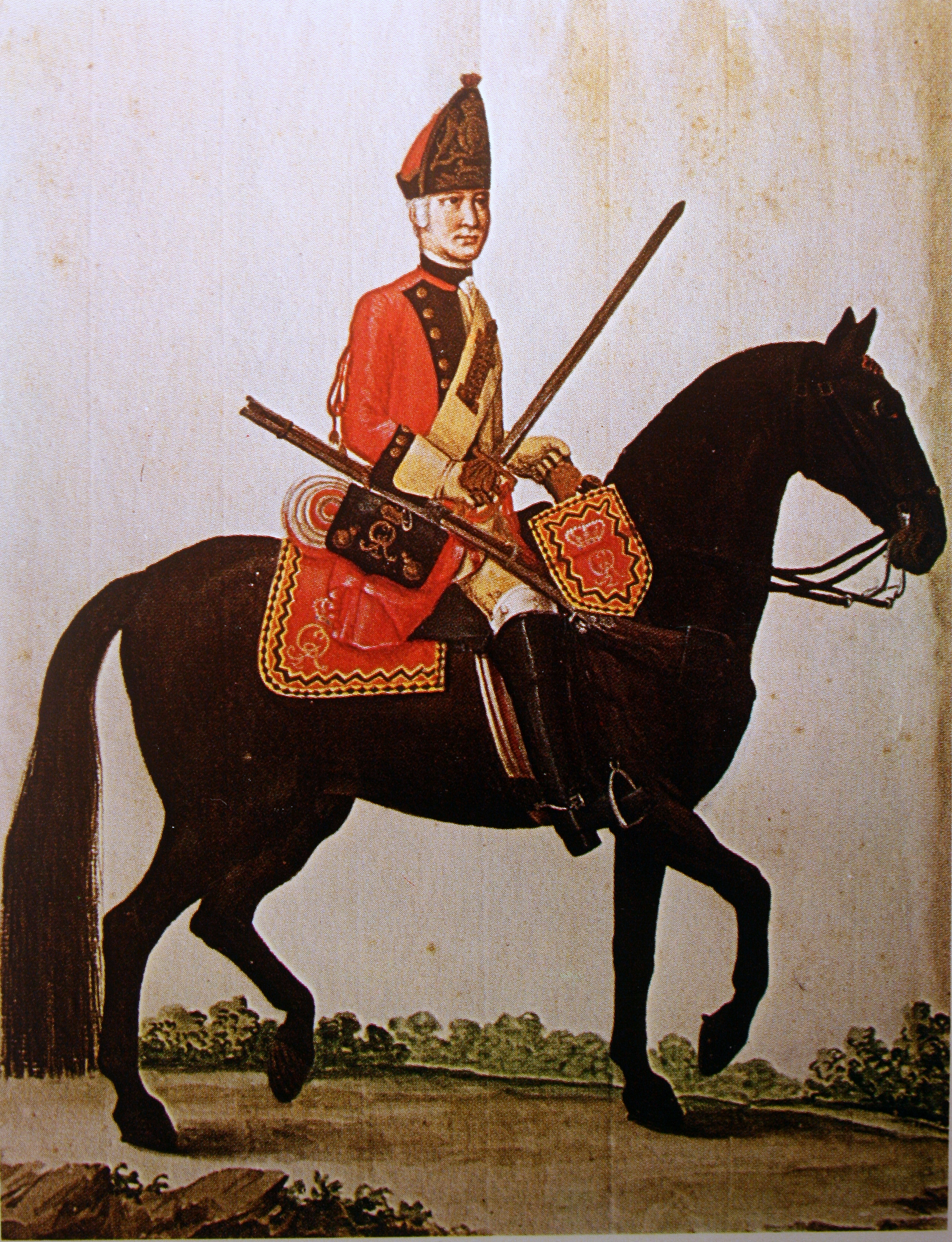 Grenadier à cheval der kurhannoverschen Armee während des Siebenjährigen Krieges.